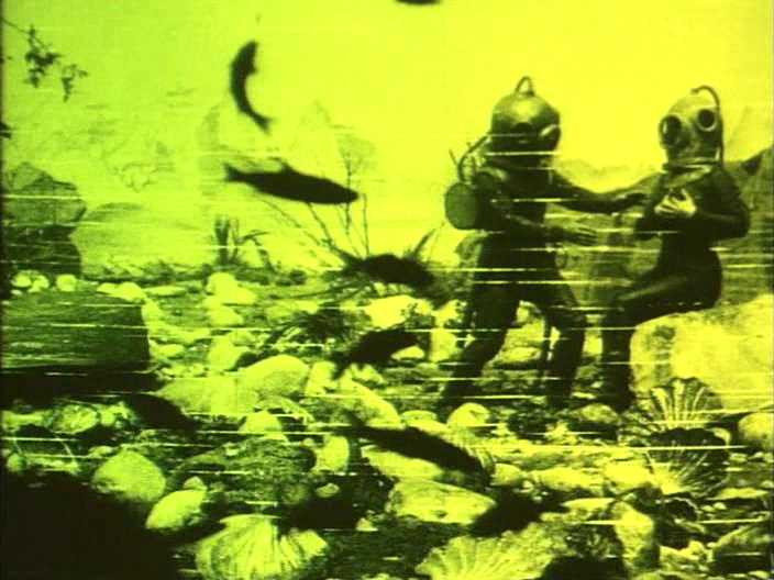 Description